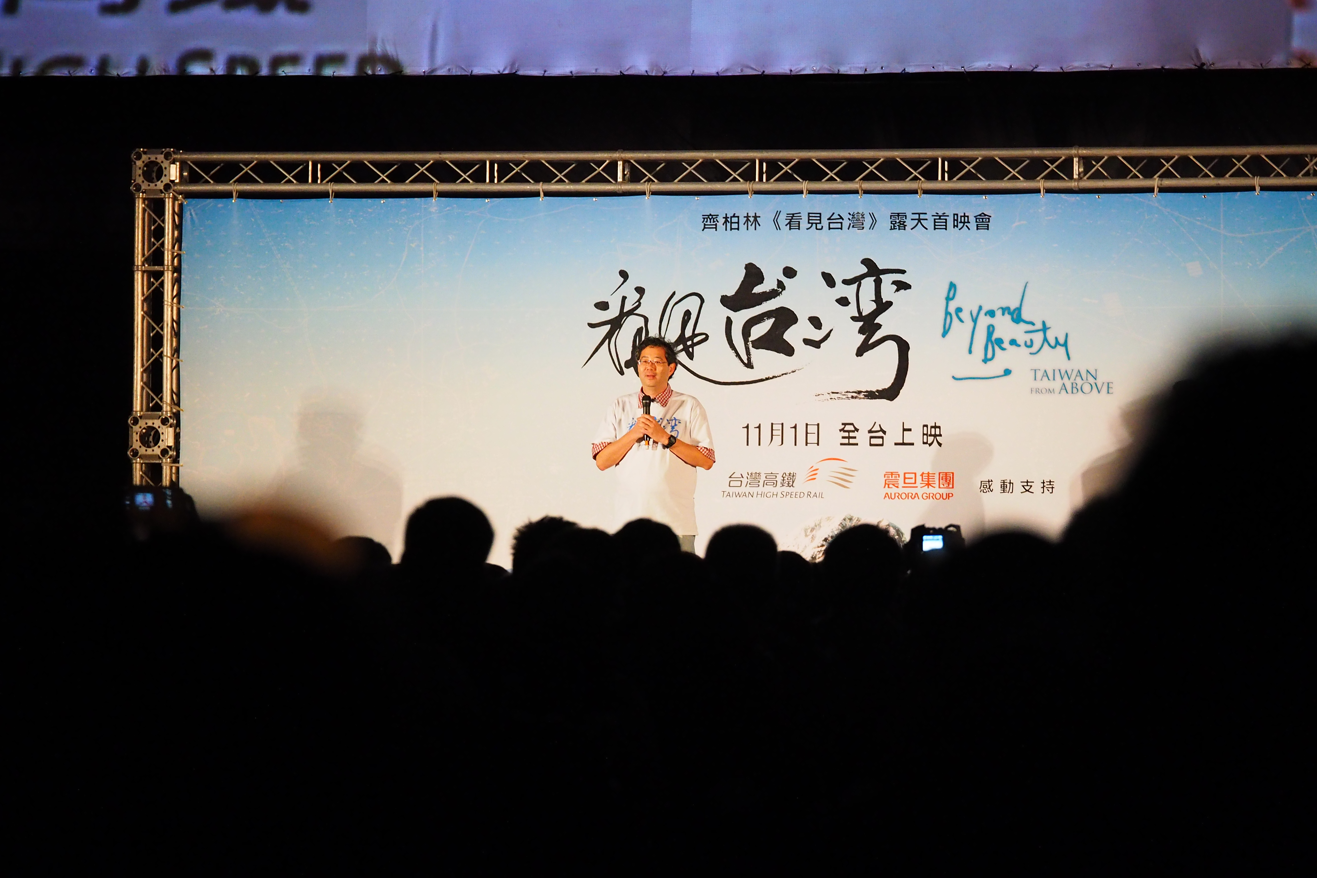 2013/10/30 - 齊柏林執導紀錄片「看見台灣」露天首映會在臺北自由廣場前